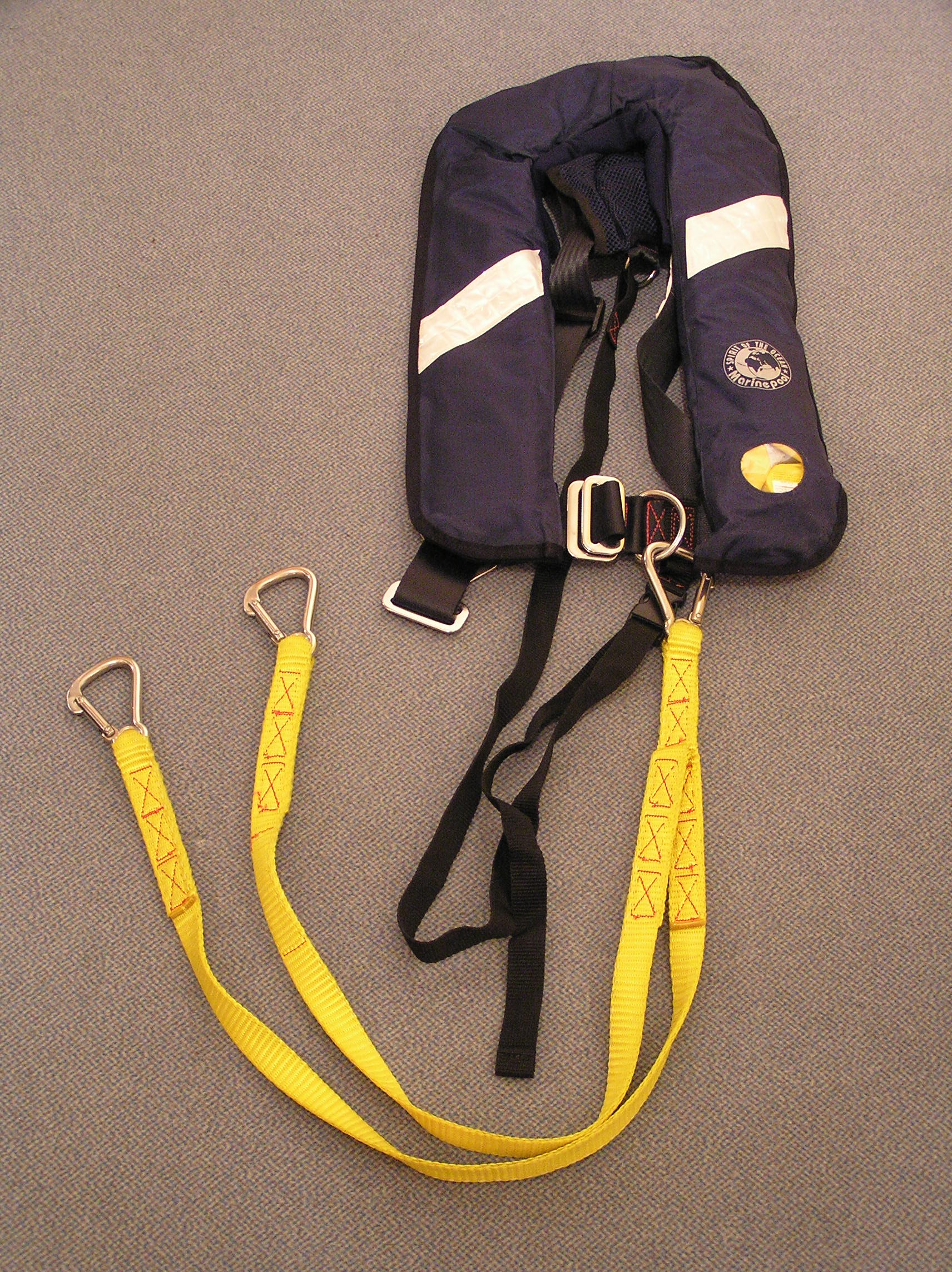 Automatische Rettungsweste von Marinepool Typ 275 Newton mit Schrittgurt und Lifeline